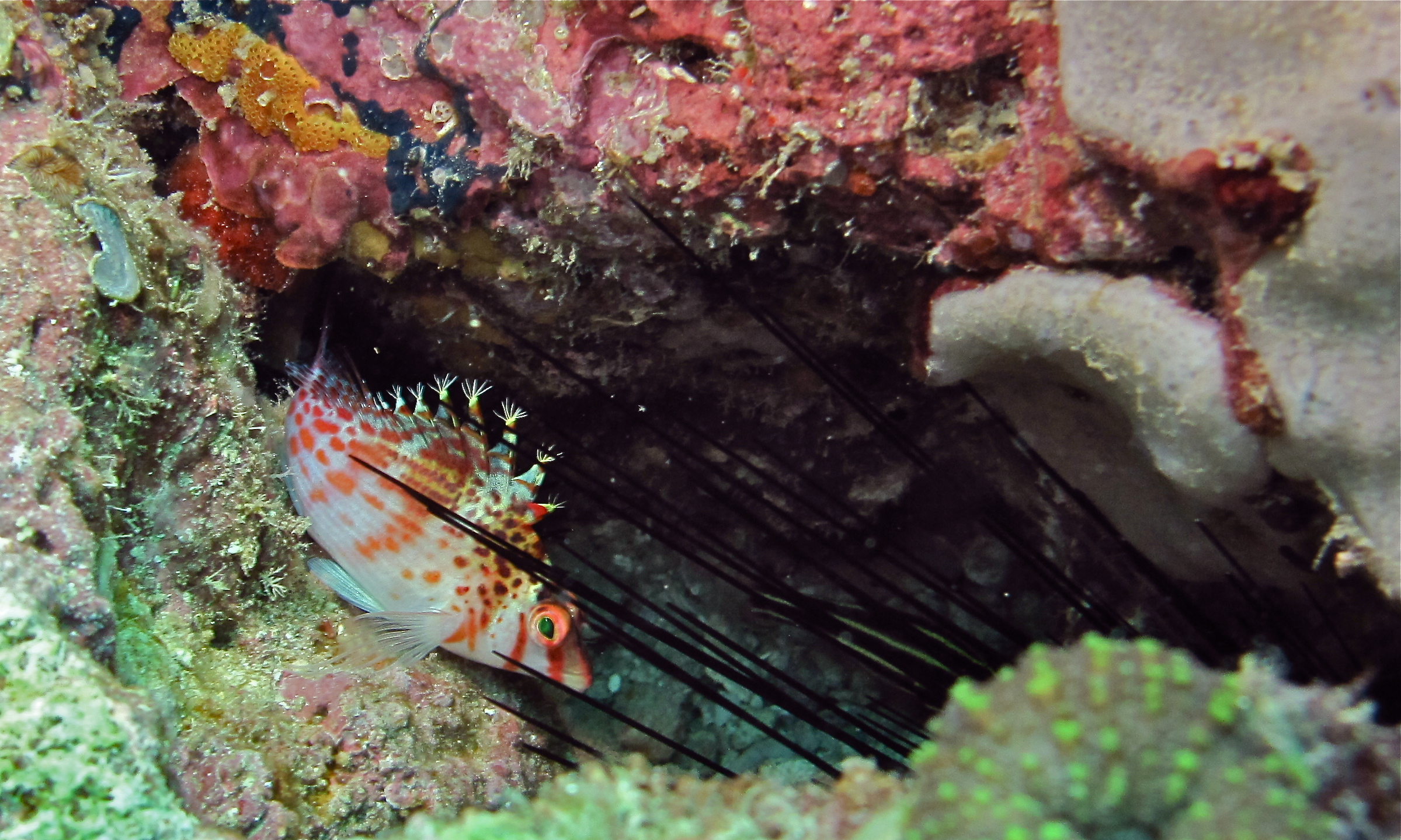 Eel Garden, Mabul, Sabah, MALAYSIA